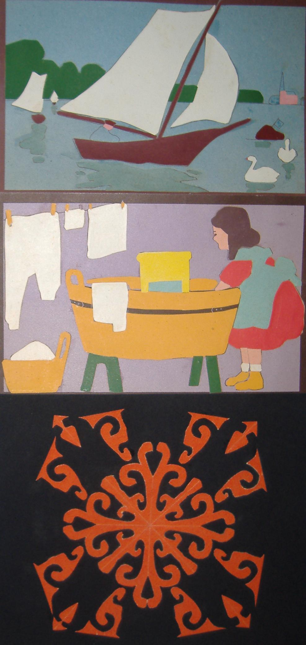 Aus der Fröbelschen Beschäftigungsmappe der Seminaristin Karolina Riedlinger(Jahrgang 1913-1915)